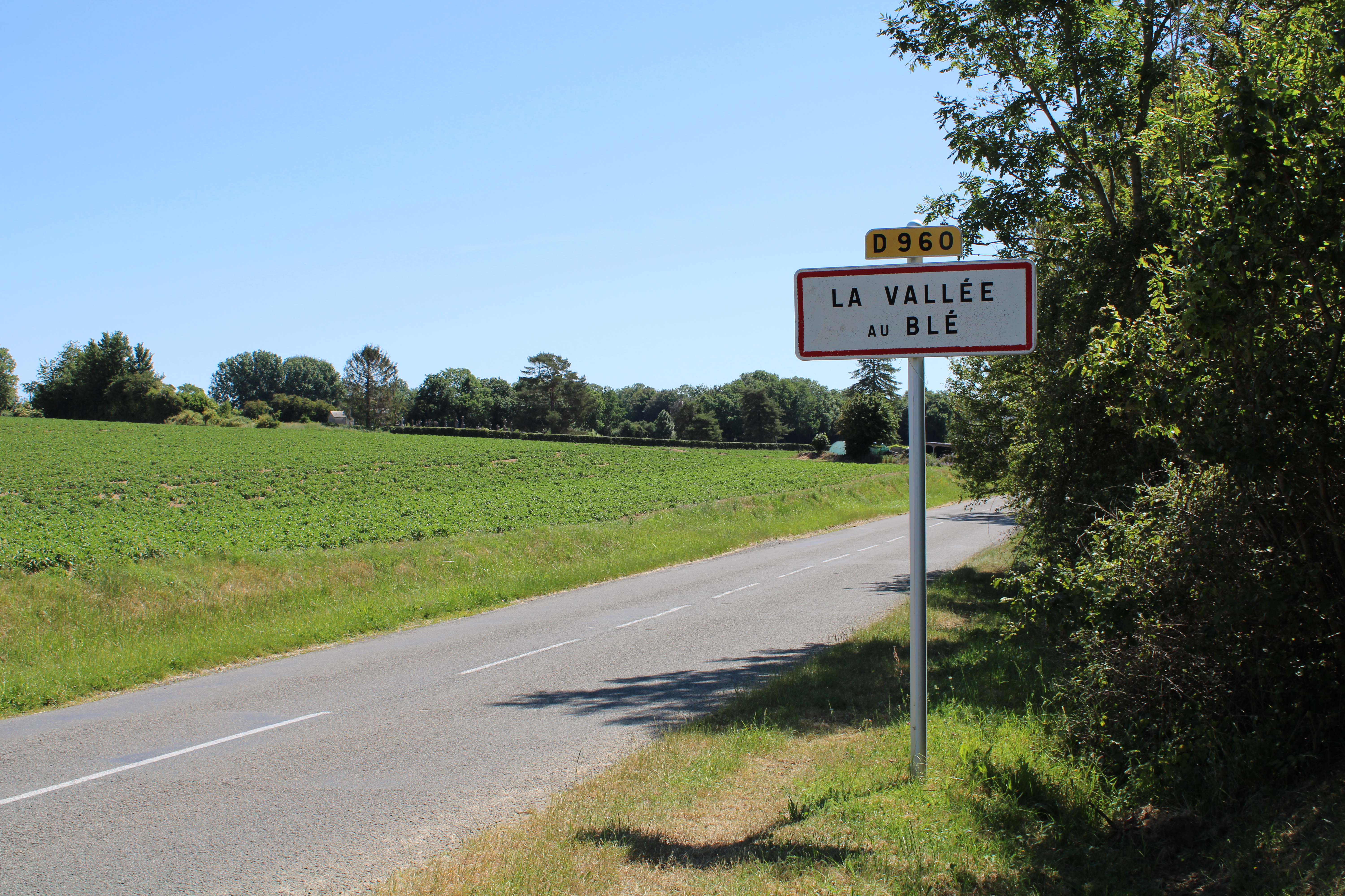 Entrée du village